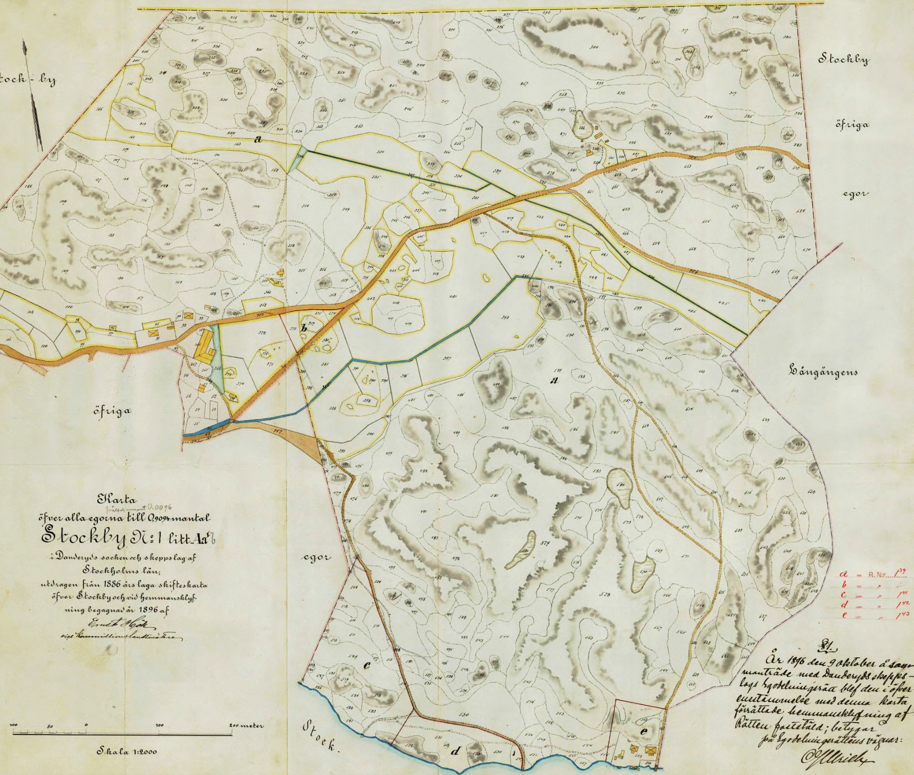 Karta över Stockby No 1 litt Aa I